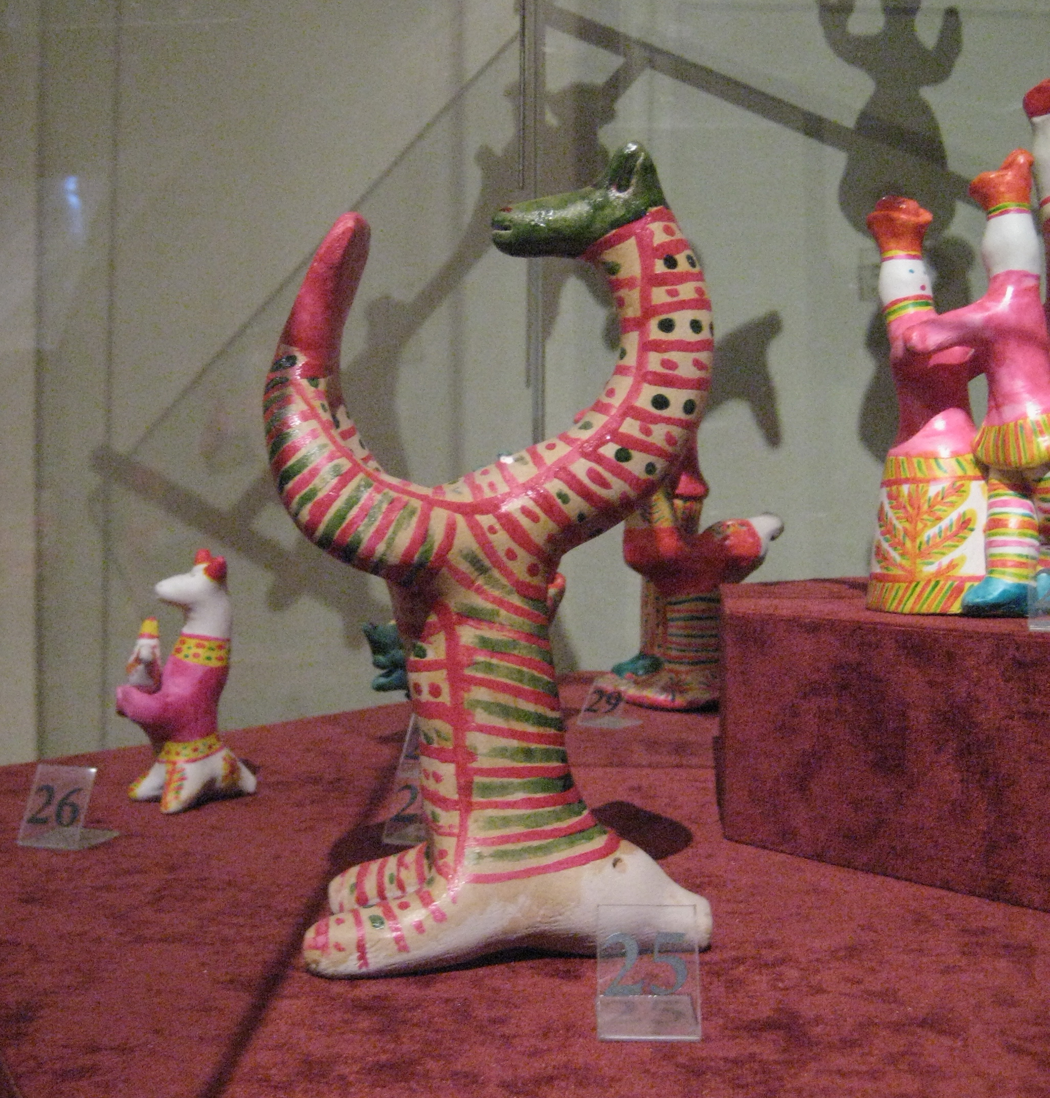 Игрушки